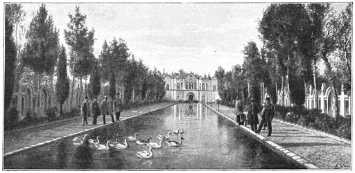 "Tuinen van Bagh-i-Zirisf, te Kirman"